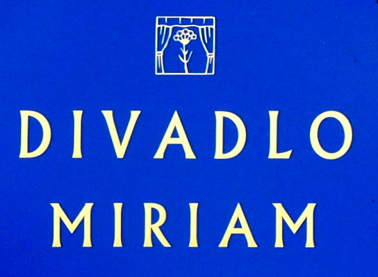 Divadlo Miriam při kostele Neposkvrněného početí Panny Marie ve Strašnicích